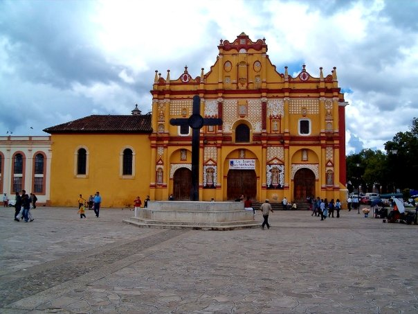 Ubicada en la Ciudad de San Cristobal de las Casas; Chiapas MEXICO